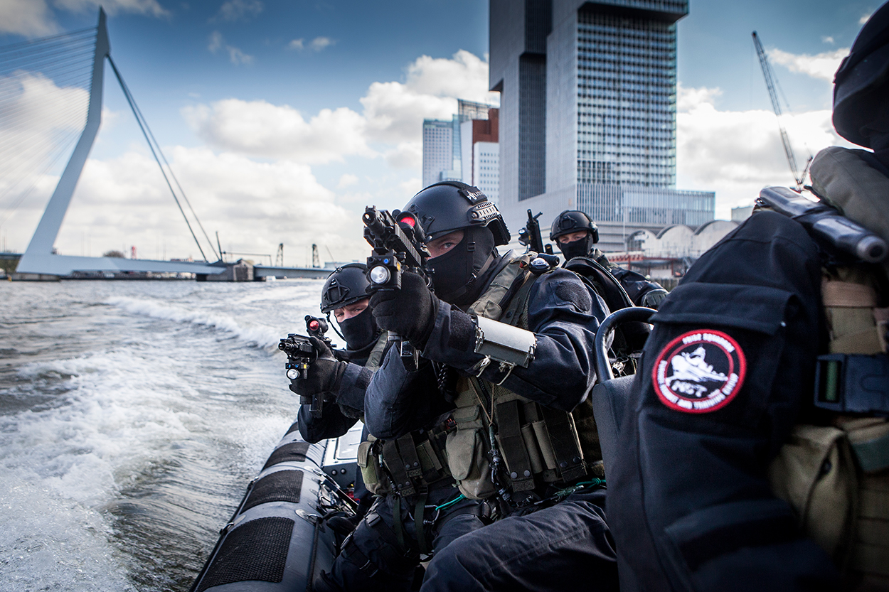 Samenwerking met politiemensen blijkt van grote meerwaarde bij het optreden van NLMARSOF.